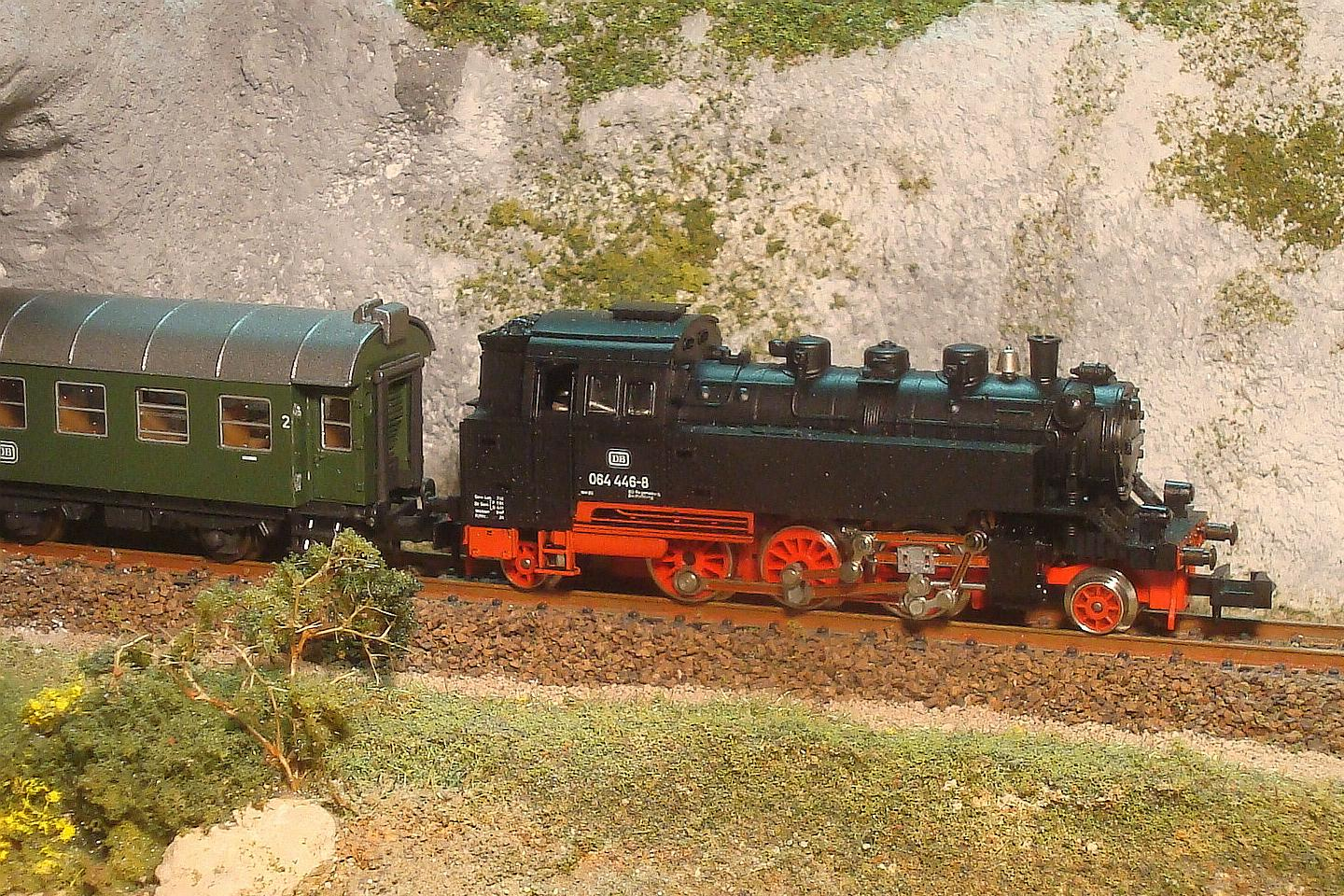 Ausschnitt aus einem privaten Diorama in der Spur N im Januar 2011. Modell einer Einheits-Personenzugtenderlokomotive der Baureihe 64 von Minitrix und eines Dreiachsigen Umbau-Wagens B3yg der Deutsche Bahn (DB) von Roco.